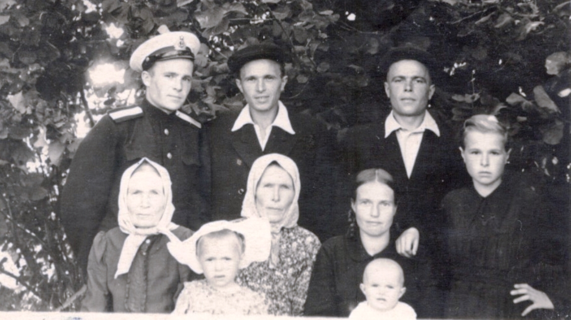 Фото сделано в д.Подлипье,Опочецкого р-на,Псковсой обл.Россия.